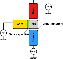 set schema